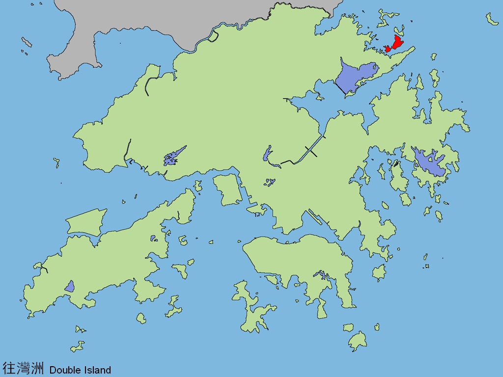 中文（香港）: 往灣洲。